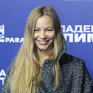 Светлана Устинова